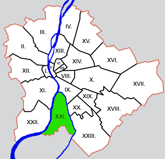 Budapest kerületei: XXI. kerület